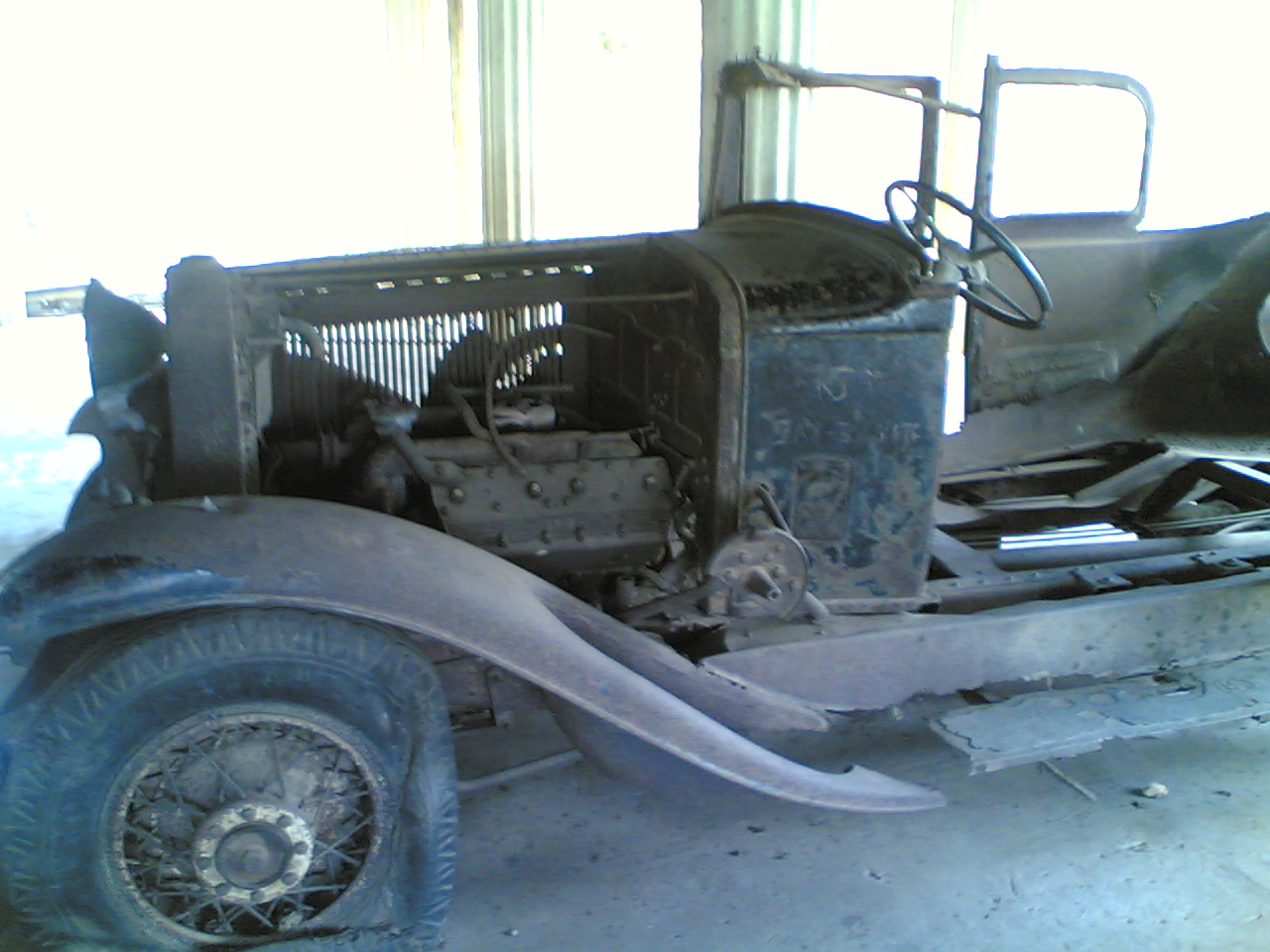 Première voiture arrivée en RDCongo